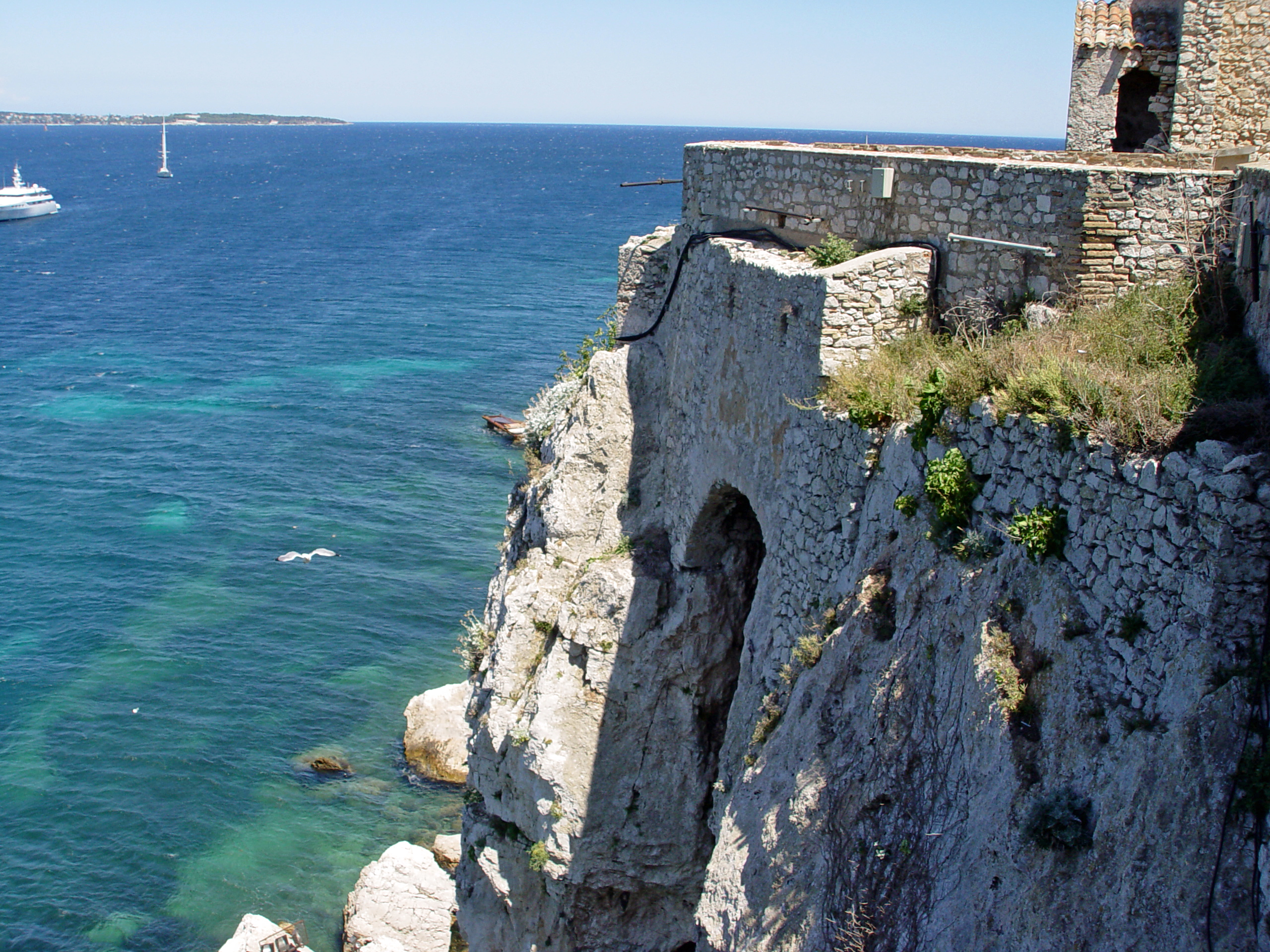 Fort Royal auf der Insel Sainte Marquerita